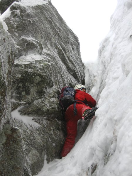 Alpinisme hivernal dans les Vosges - Hohneck. Winter mountaineering in the Vosges - Hohneck. florent Claude.